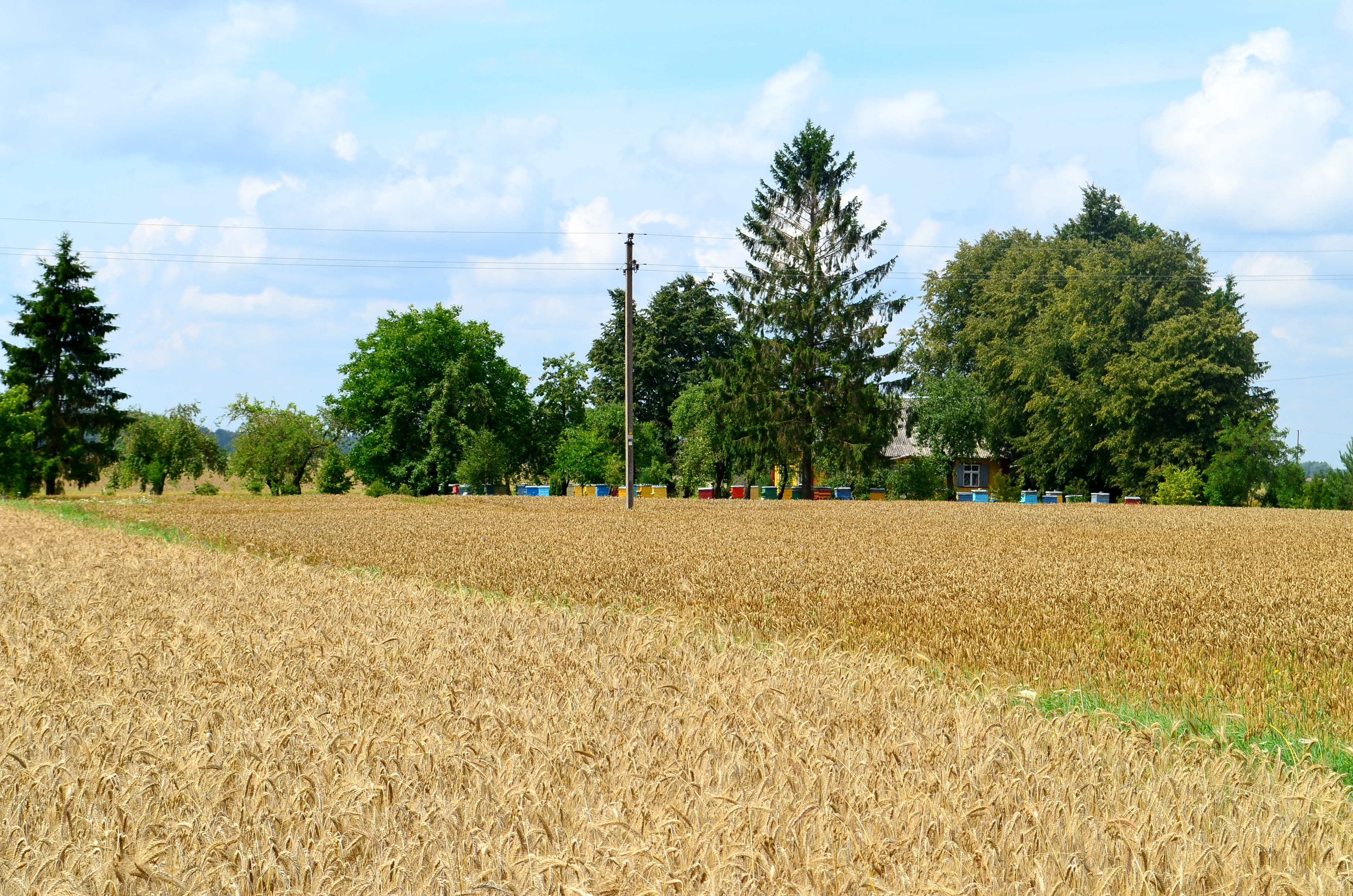 Debikonių k., Ramygalos sen., Panevėžio raj.